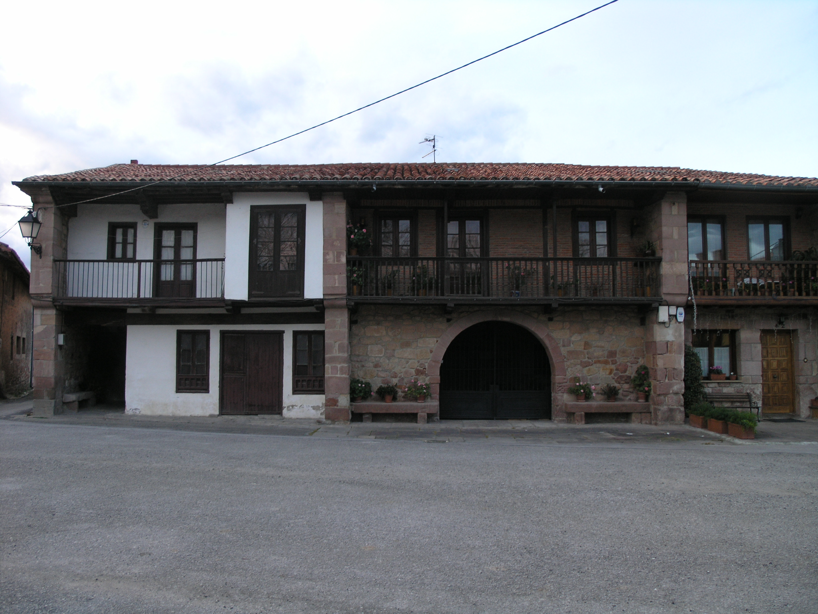 Casas populares, en el Barrio de Rodanil de Viérnoles, en el municipio de Torrelavega, Cantabria, España. Hilera de tres casas, la del medio del siglo XVIII.